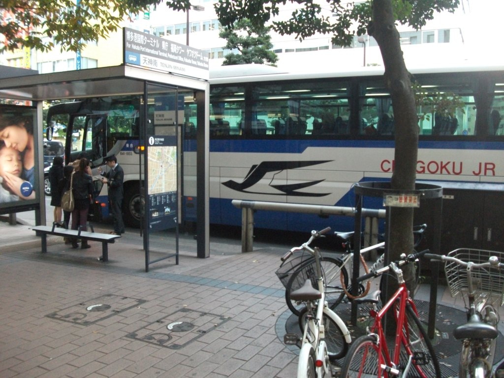 福岡天神バスで乗車扱い中の福岡・山口ライナー